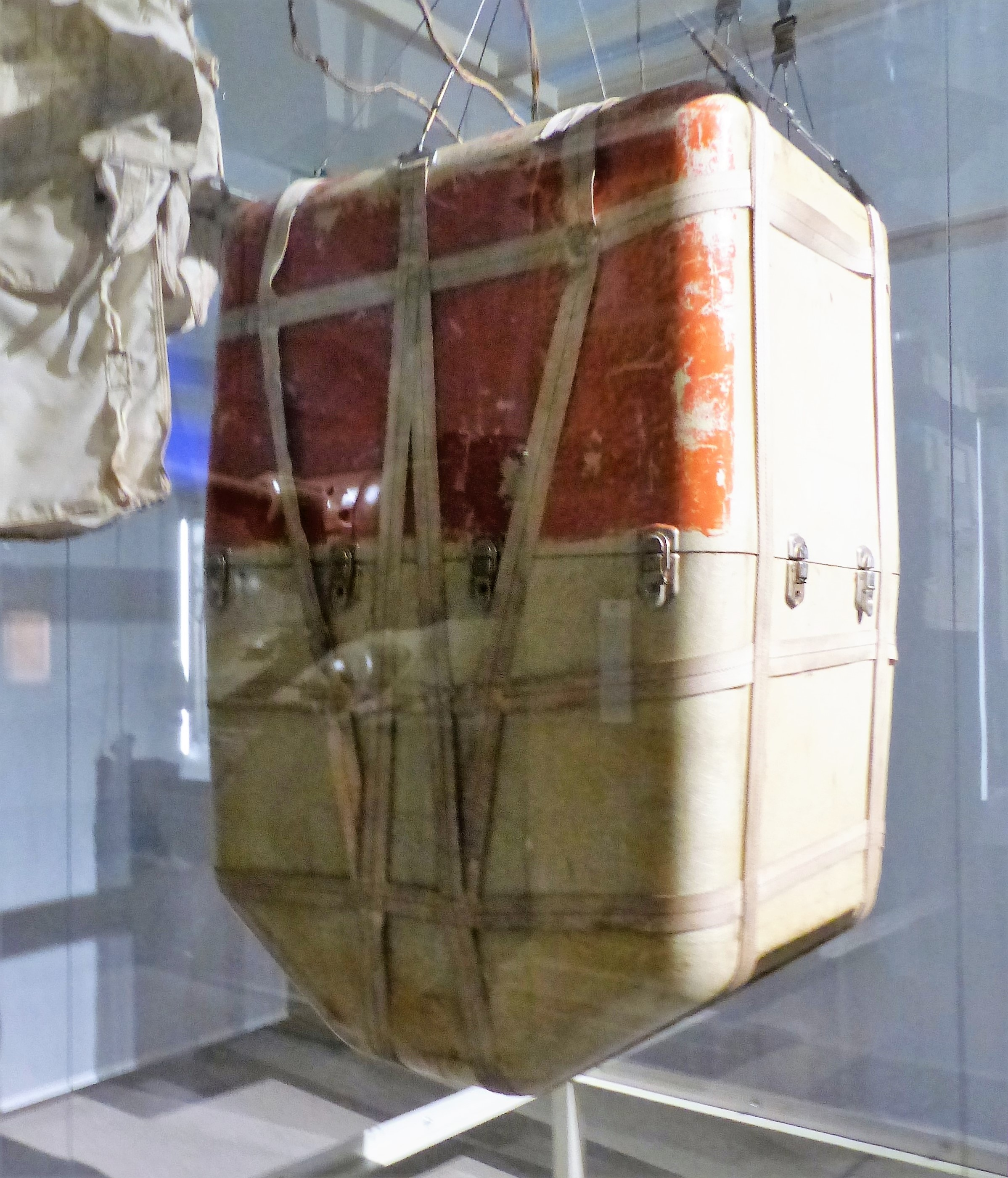 Gondel, Militärischer Beobachtungsballon Genetrix, 1956; Exponat im Militärhistorischen Museum der Bundeswehr, Dresden